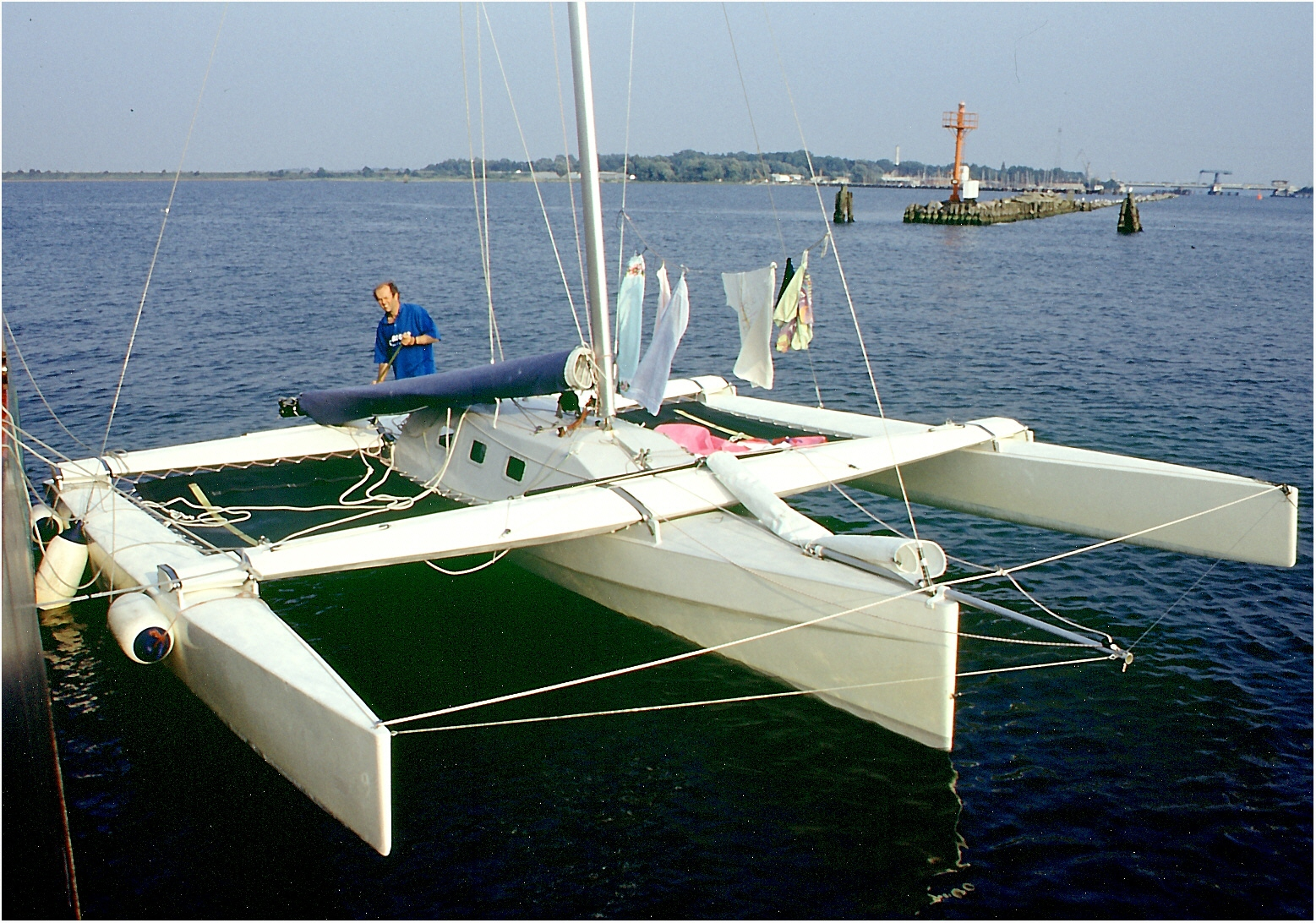 Fliegenklatsche. Design und Bau: Dr Joachim Harpprecht